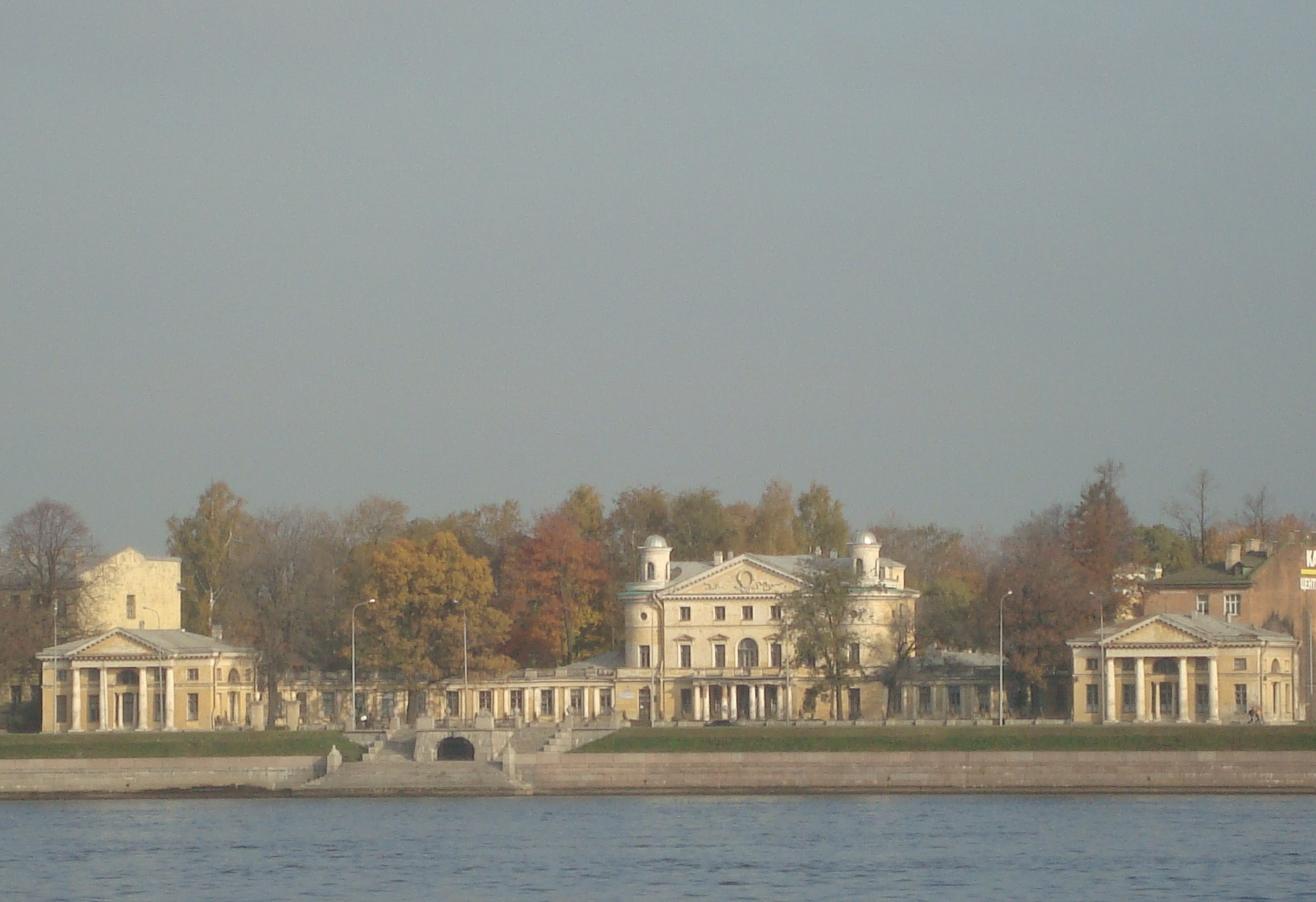 Дача А.А. Безбородко (Кушелевых-Безбородко): Свердловская набережная, 40, 44, Полюстровский проспект, Пискаревский проспект, Феодосийская улица, Калининский район, Санкт-Петербург